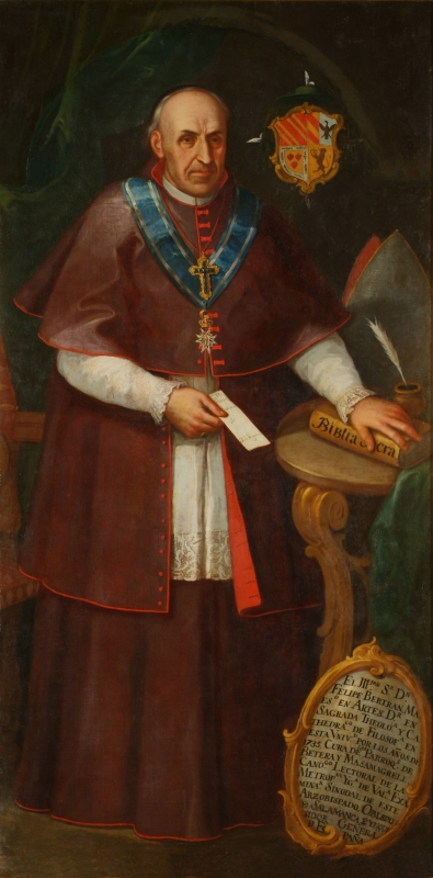 Retrato del Felipe Bertrán y Casanova (1704-1783), que fue obispo de Salamanca e inquisidor general de España.